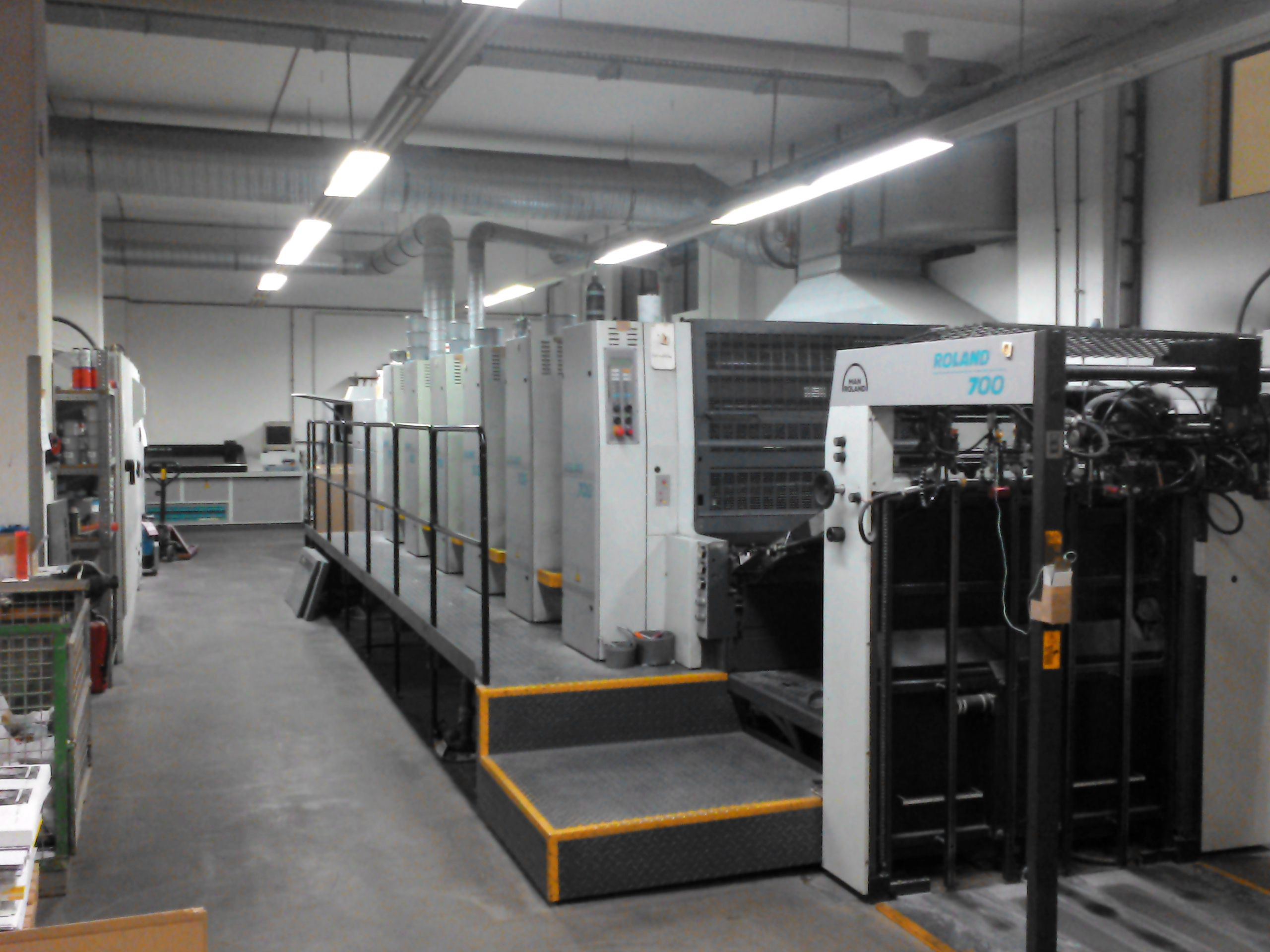 Oktoberdruck ist eine 1973 von einem Kollektiv gegründete Druckerei in Berlin, die im Zusammenhang mit der ersten Gründerwelle der Alternativprojekte entstand. Die Firma zählt zu den bewusst wachstumsneutralen Unternehmen und produziert ökologisch orientiert und im Rahmen der Solidarischen Ökonomie.